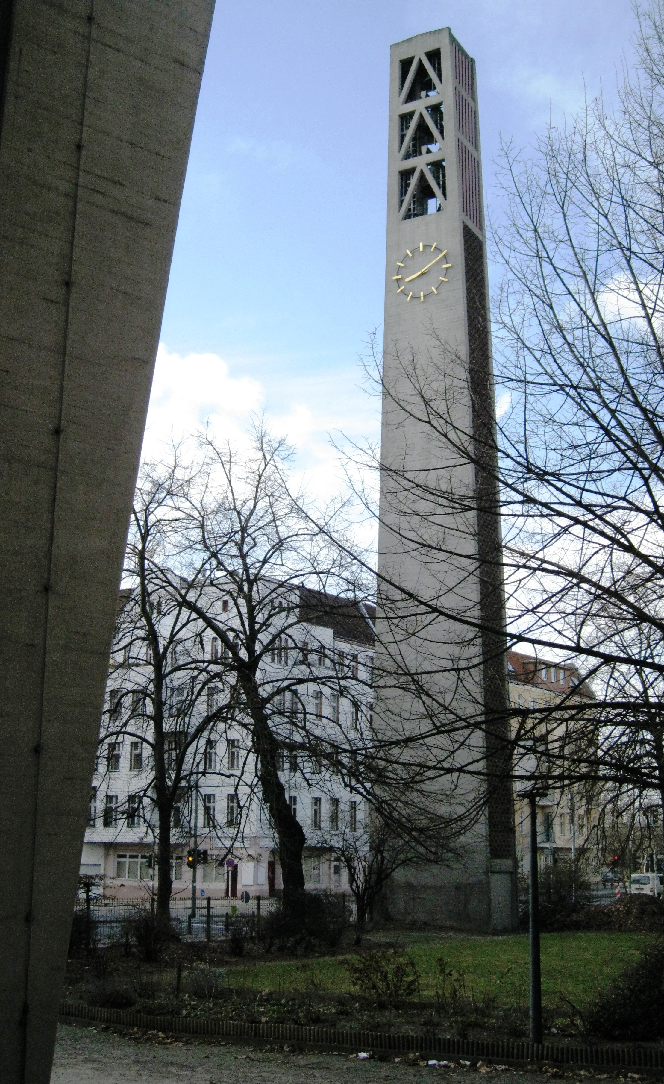 Glocken- und Uhrenturm der Vaterunser-Kirche